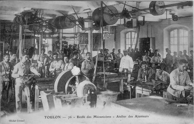 Ateliers des ajusteurs - Toulon